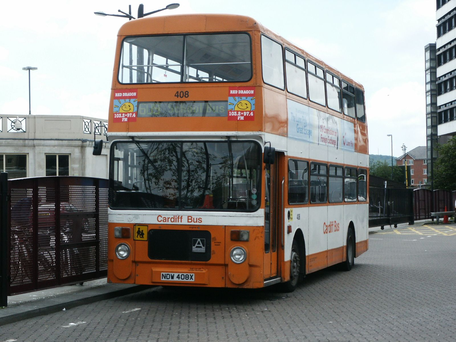 NDW408X 240602